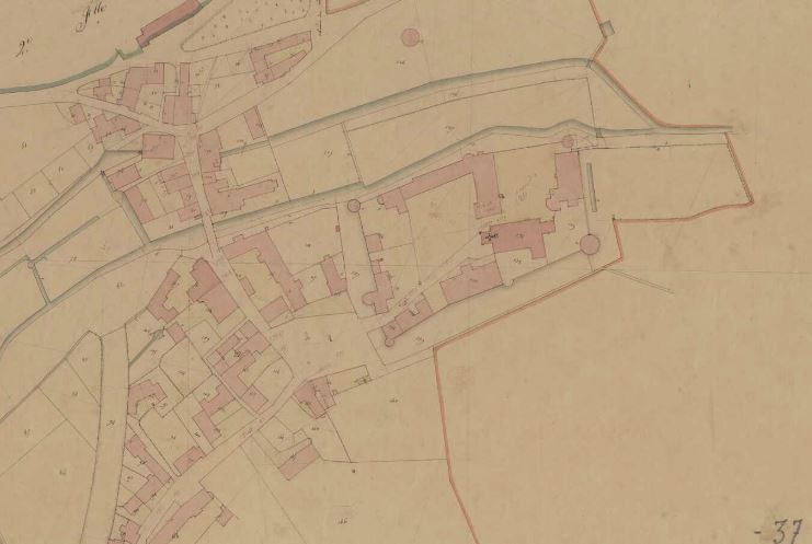 Plan cadastrale napoléonien du Louroux (1832)